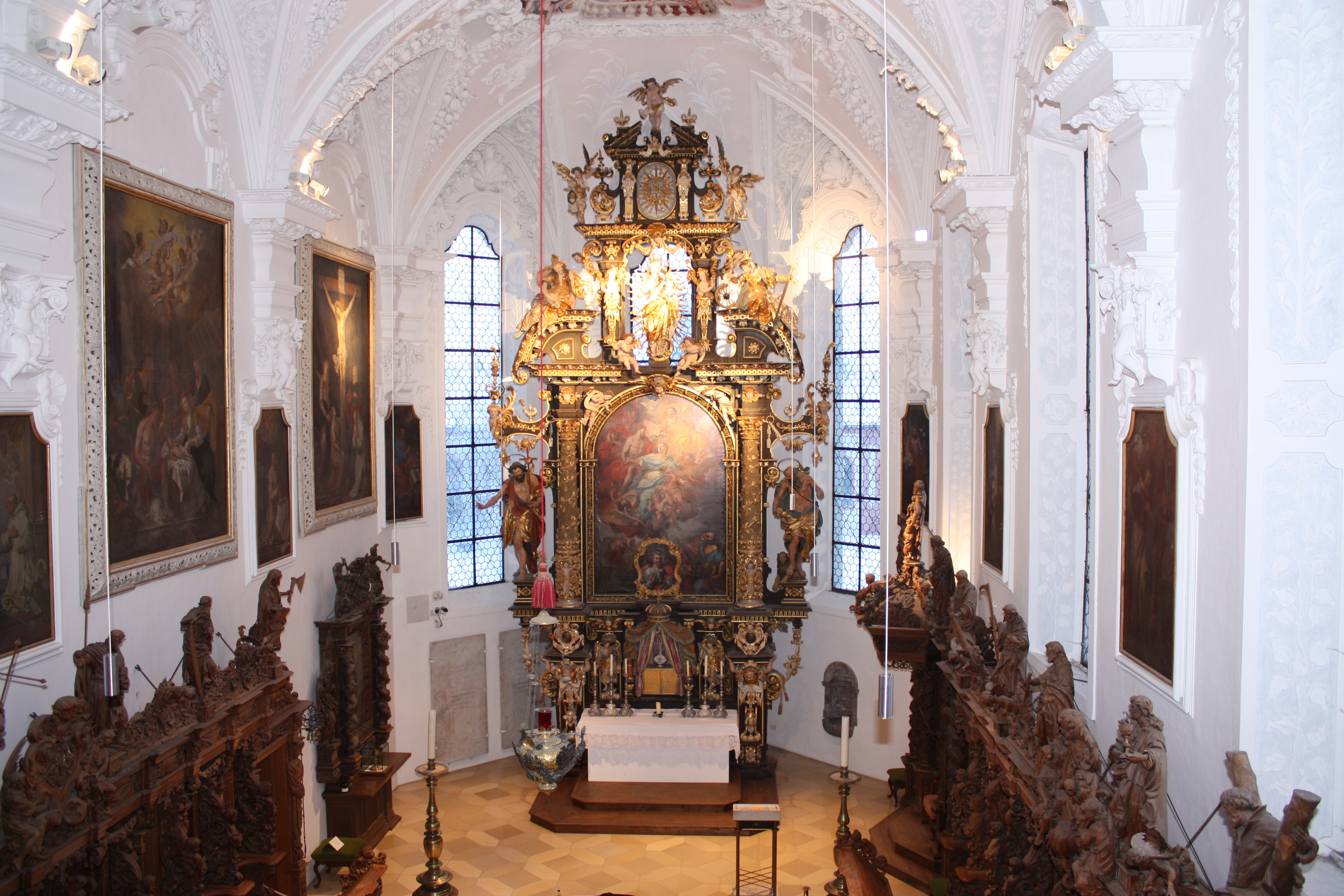 Gemälde in der ehemaligen Klosterkirche der Kartause in Buxheim bei Memmingen